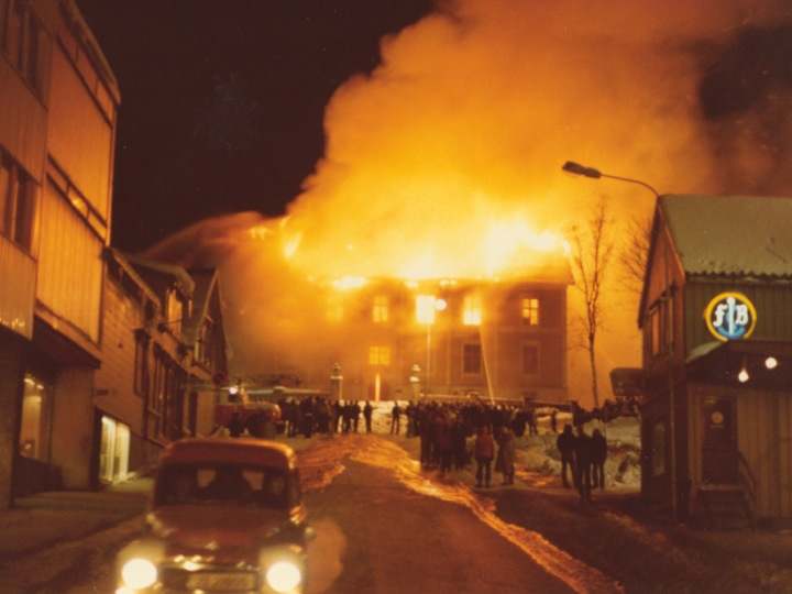 Konservatoriets gamle lokaler i brann